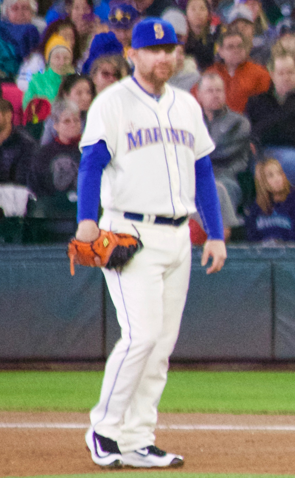 Adam Lind